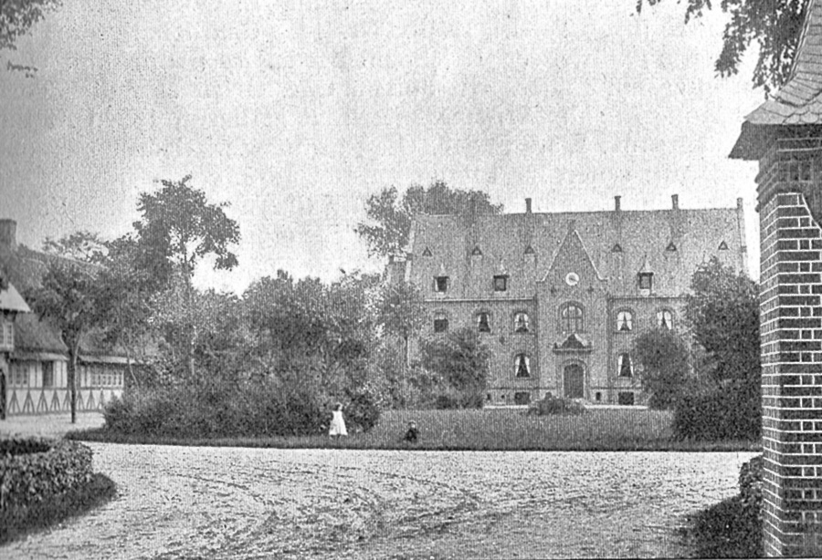 Sanderumgård er en gammel hovedgård, som nævnes første gang i 1468. Gården ligger i Davinde Sogn, Åsum Herred, Odense Kommune. Hovedbygningen er opført i 1870-1872.